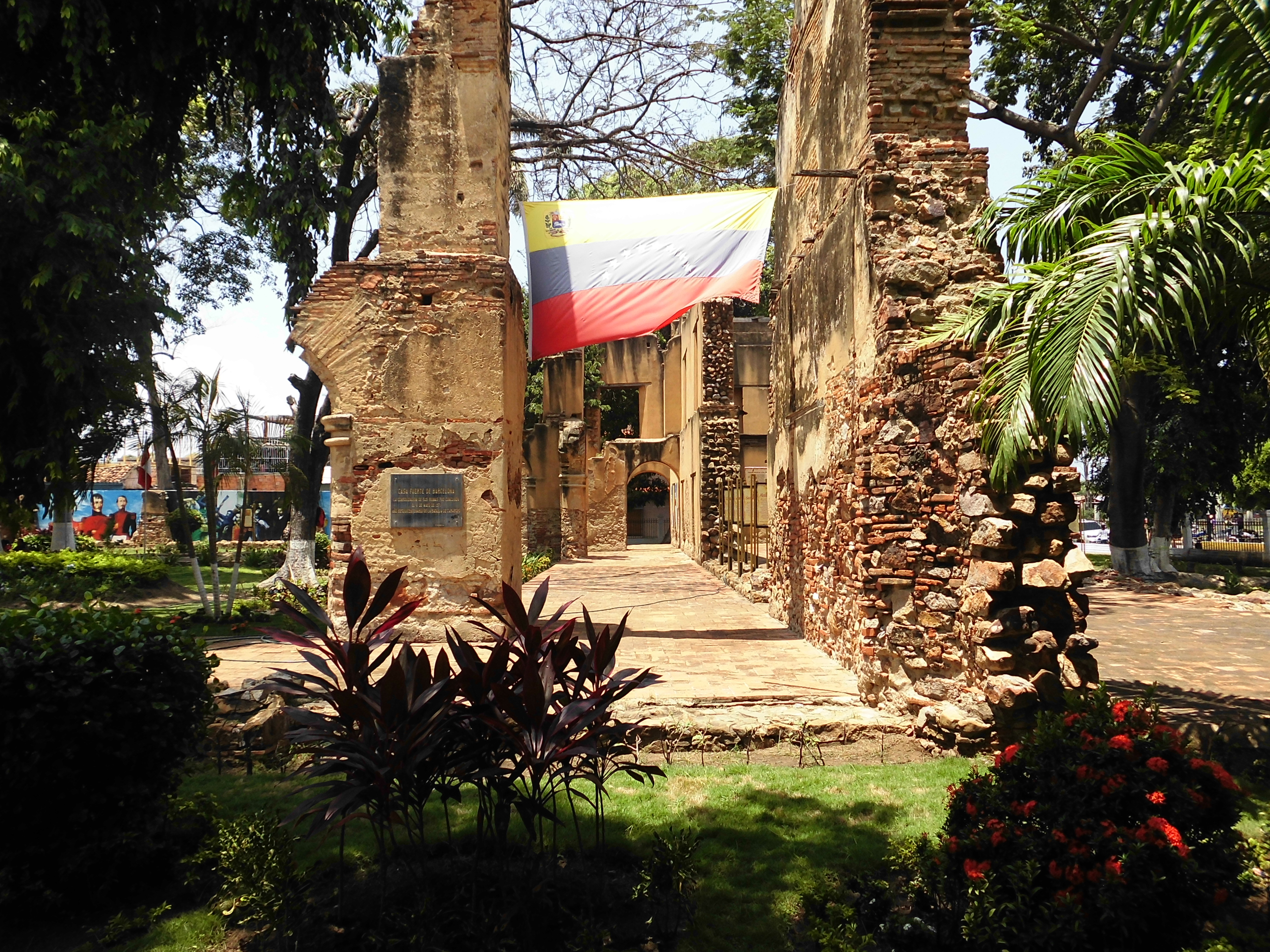 La consolidación de sus ruinas fue concluida el 5 de Mayo de 1971 año sesquicentenario de la Batalla de Carabobo. Avenida Caracas entre Calle Zamora y Avenida 5 de Julio sector Casco Central